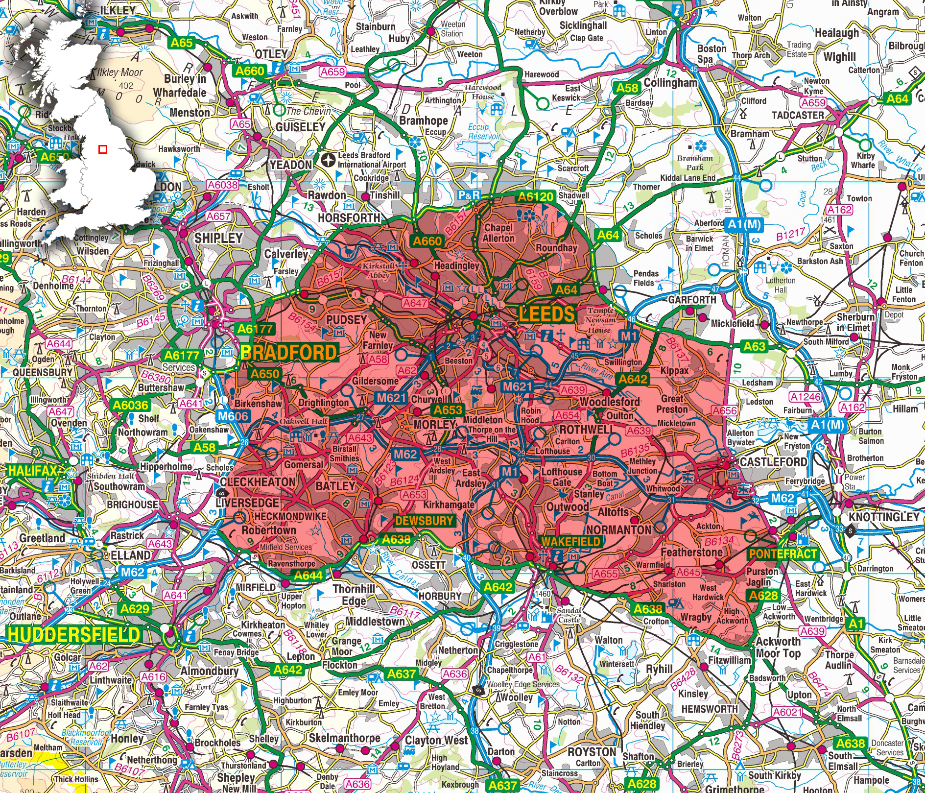 Karte des Rhubarb Triangle des Yorkshire Forced Rhubarb